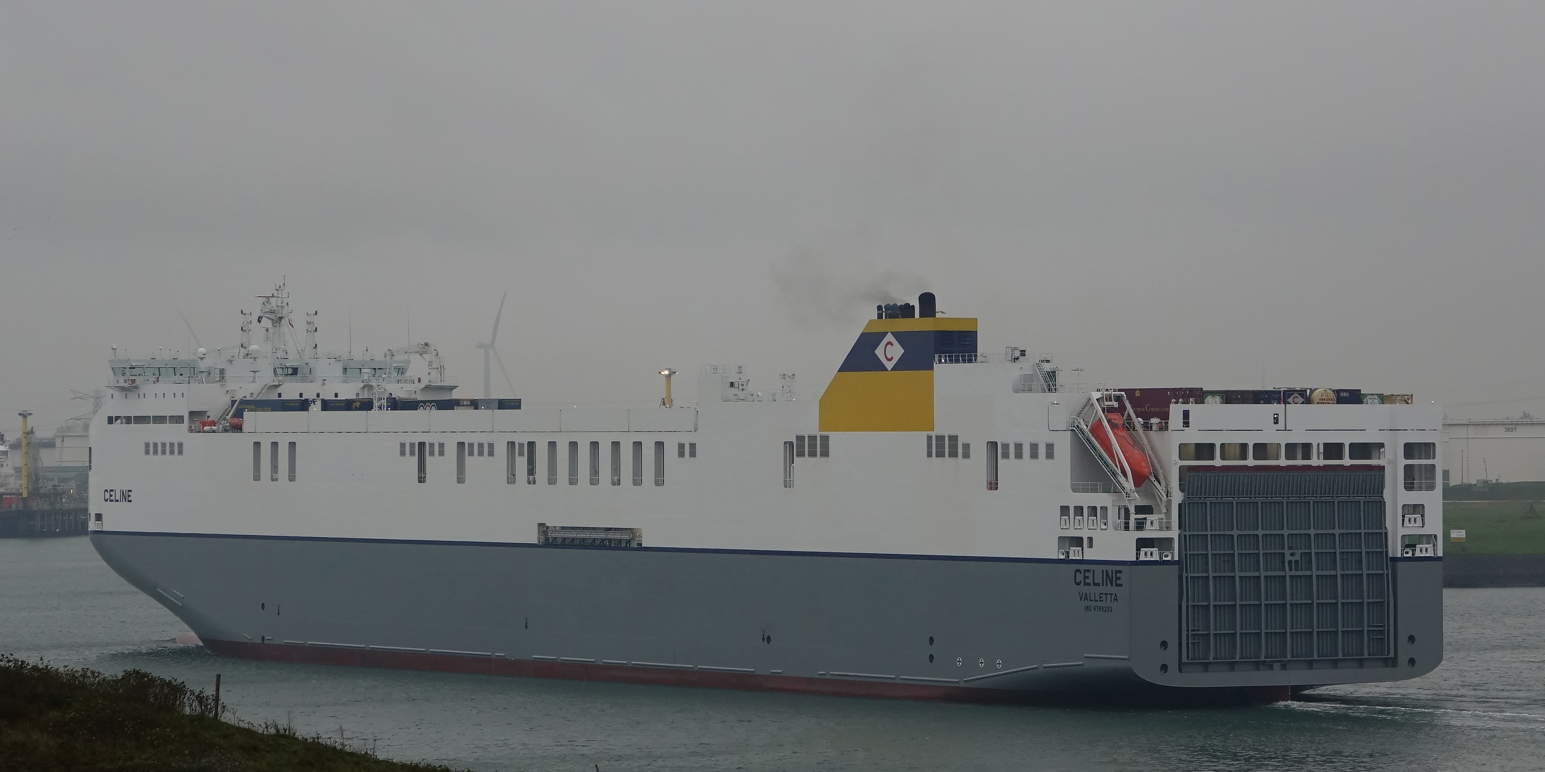 Eerste aankomst in Rotterdam van het grootste shortsea RoRo (rollon/rolloff) schip ter wereld